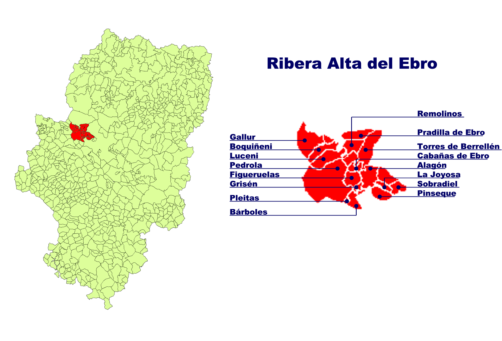 Comarca de la Ribera Alta del Ebro Creado el 02.10.2005 por Ecelan en base a Image:Aragon municipalities.png